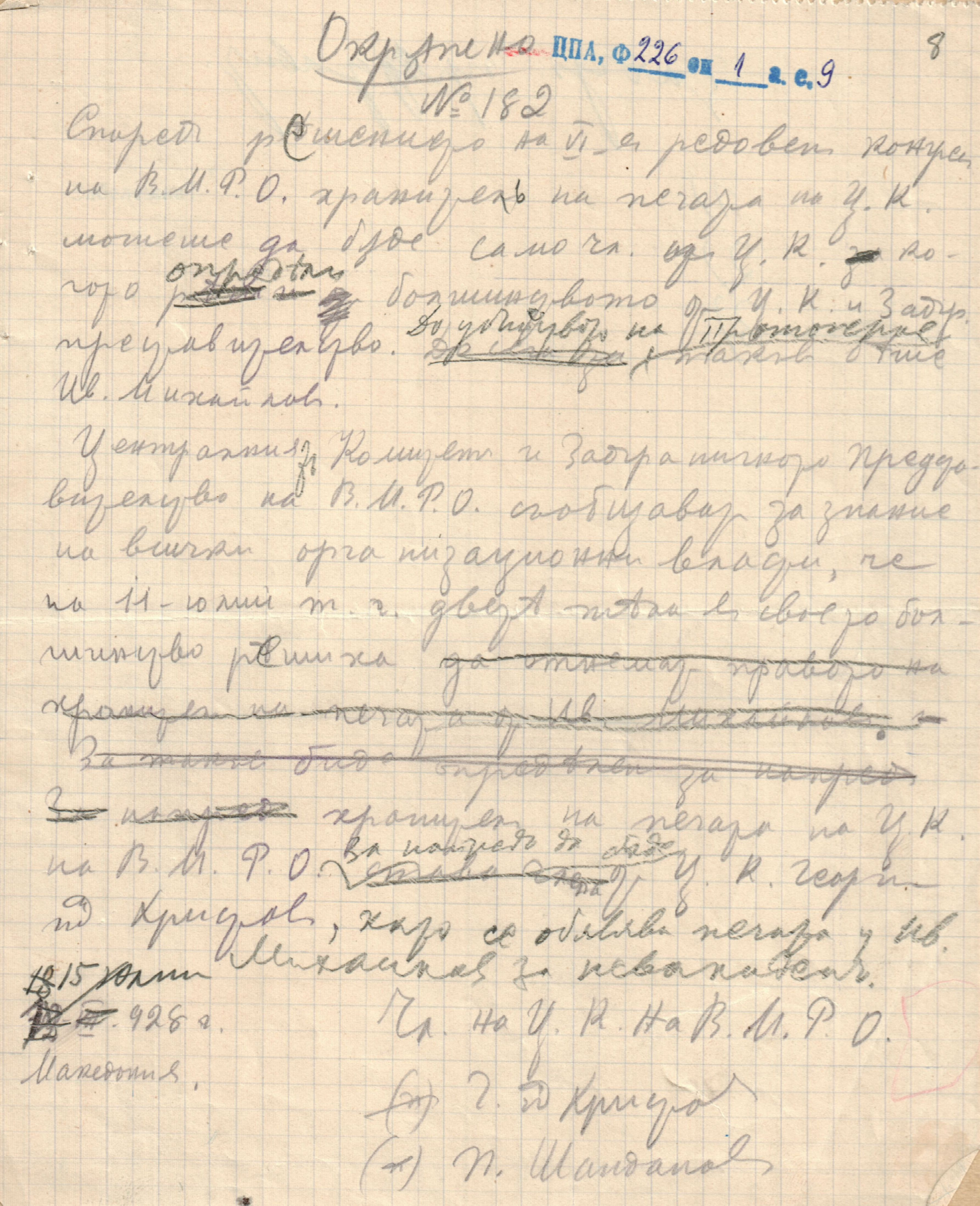 Окръжно на протогеровисткия ЦК